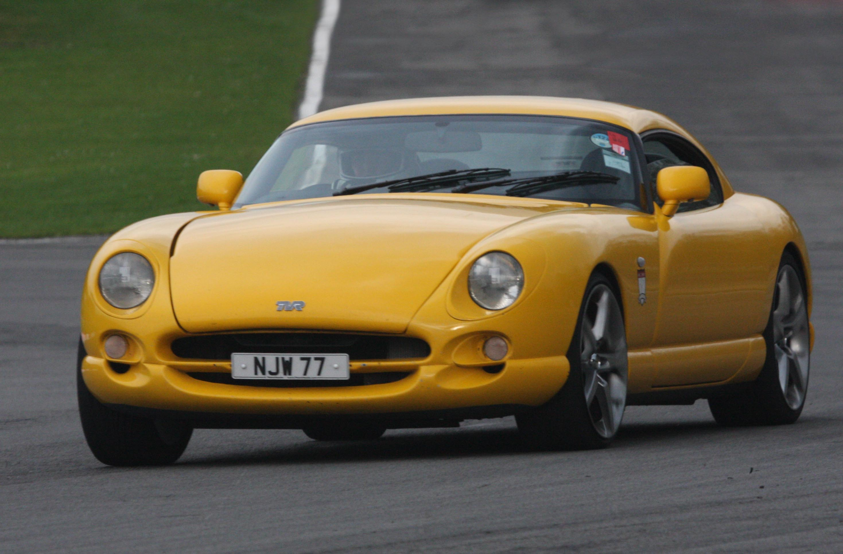 TVR Cerbera 4.5